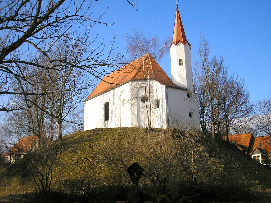 Burgstall Althegnenberg (Landkreis Fürstenfeldbruck, Oberbayern). Der Turmhügel mit der Kapelle. Eigene Aufnahme, Dez. 2007 / Motte-and-bailey castle Althegnenberg near Fuerstenfeldbruck (Upper Bavaria, Germany). The motte with the chapel. Own photo, Dec. 2007